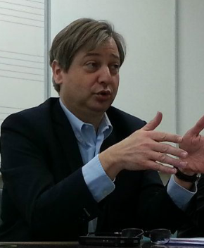 Photo